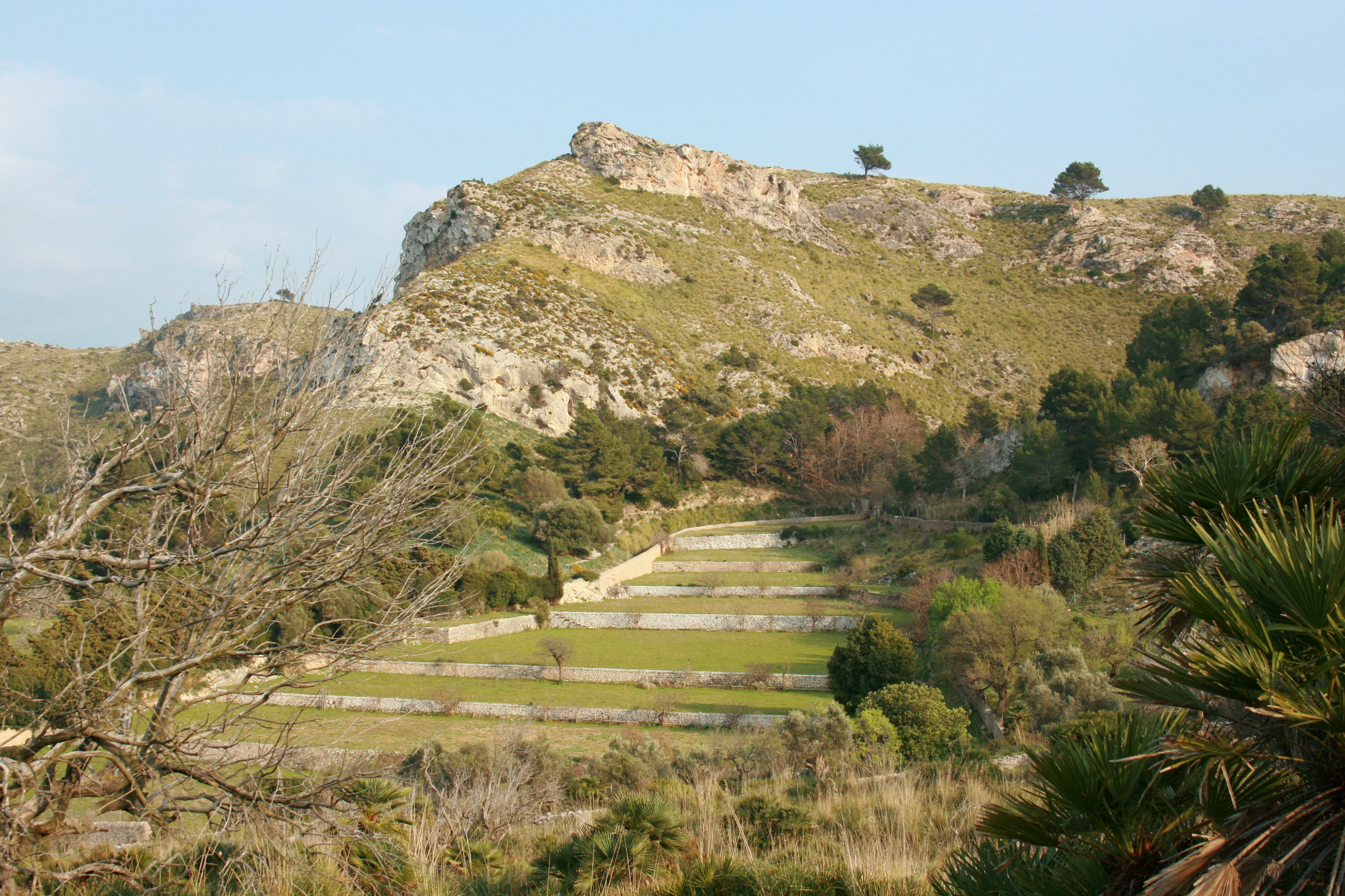 Ermita de Betlem in Artà, Mallorca